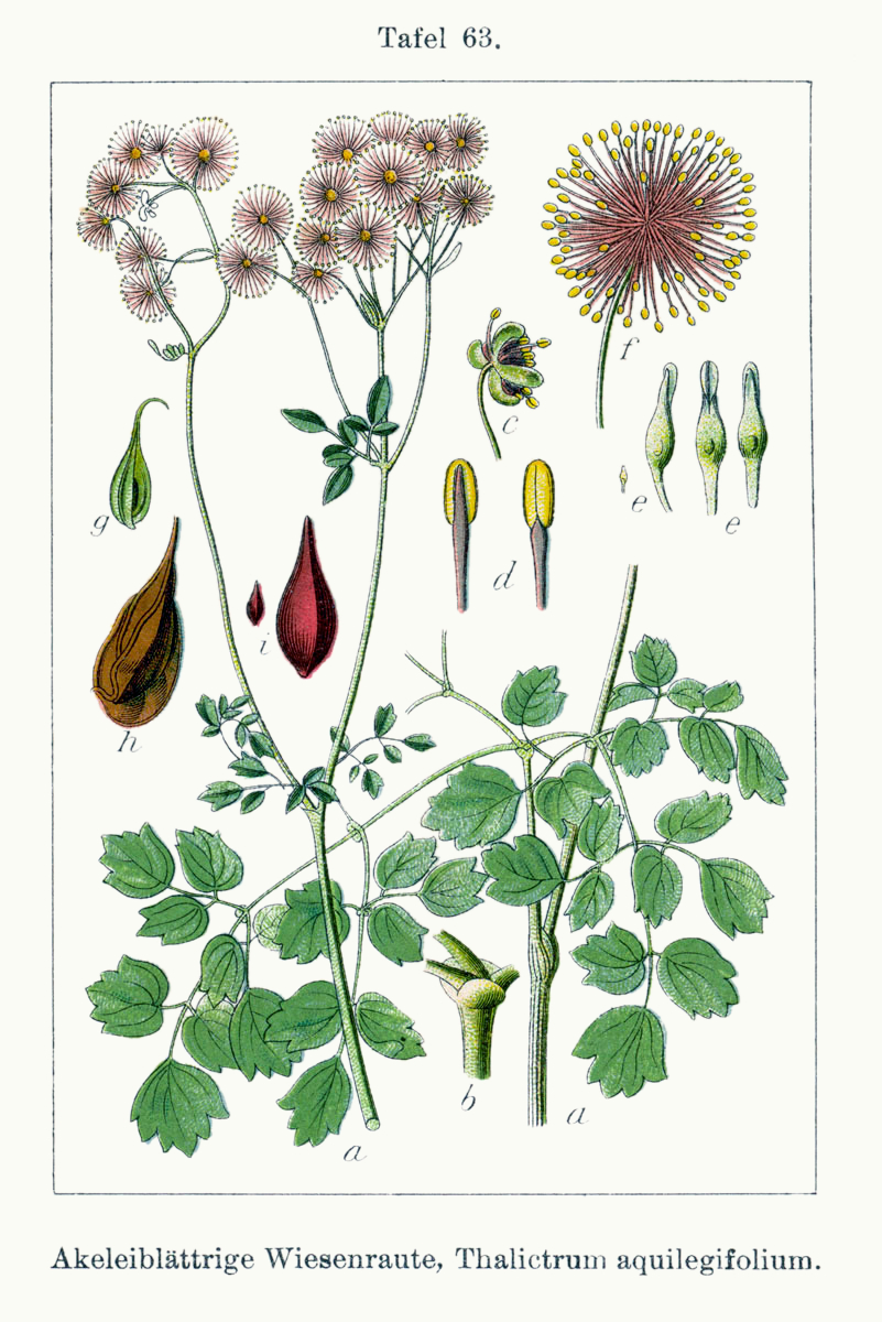 Colombine panachée, Colombine plumeuse, Pigamon à feuilles d’ancolie